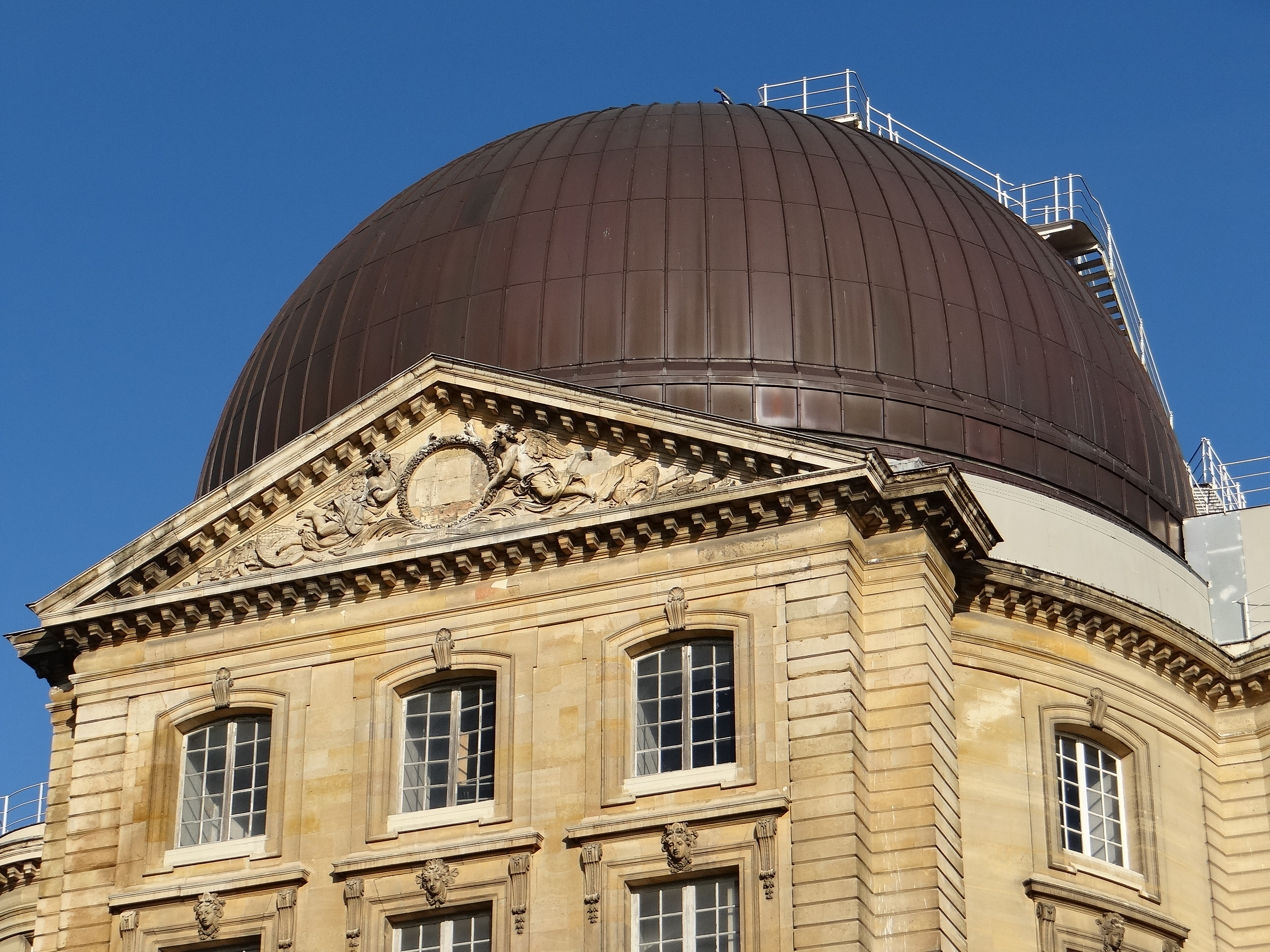 Observatoire de Meudon